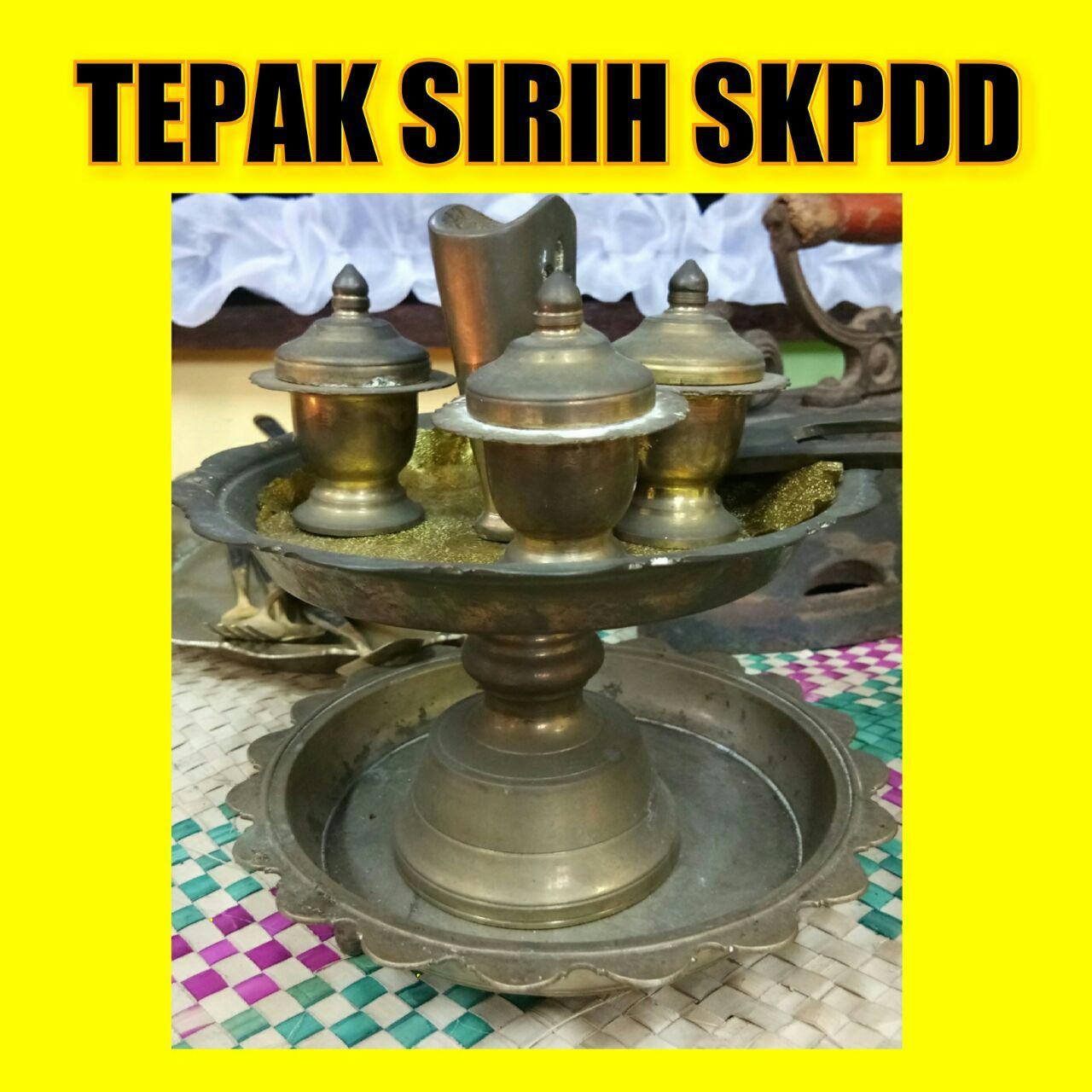 Tepak Sireh